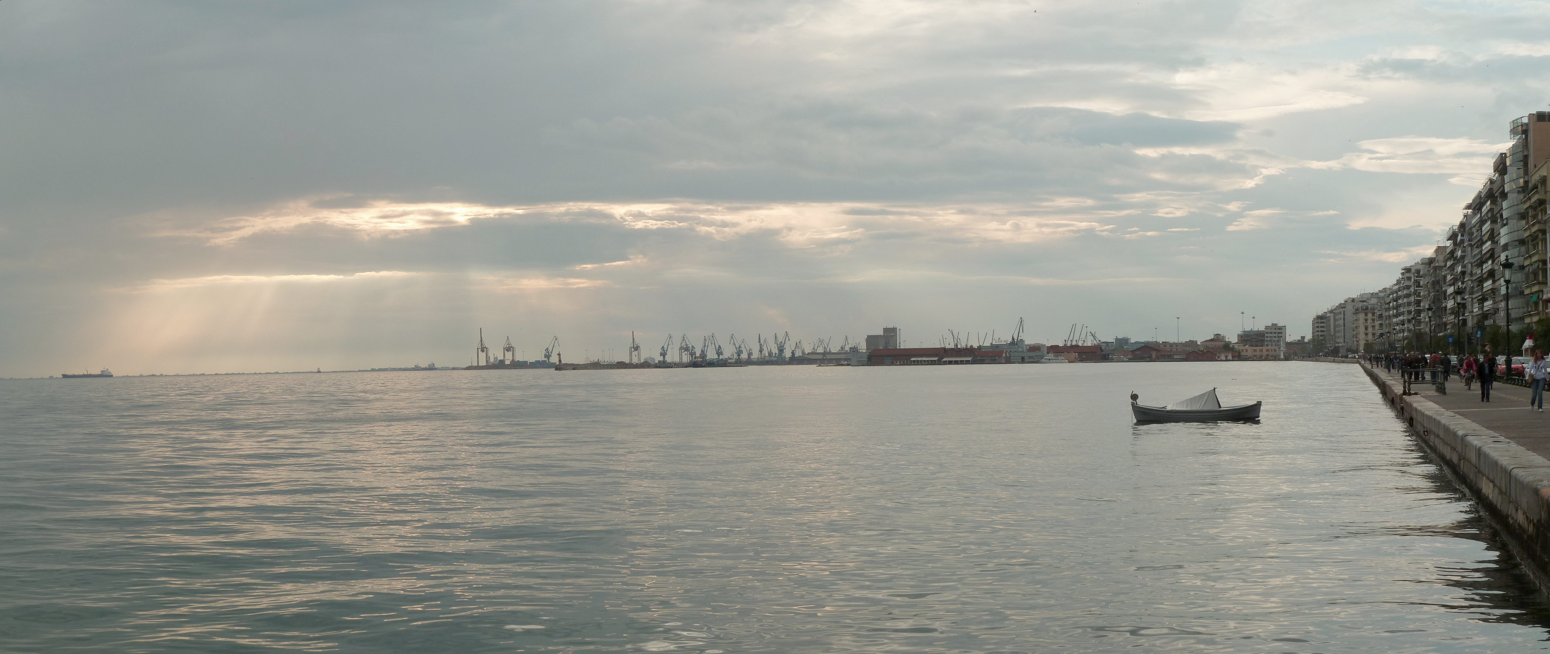 Le port de Thessalonique